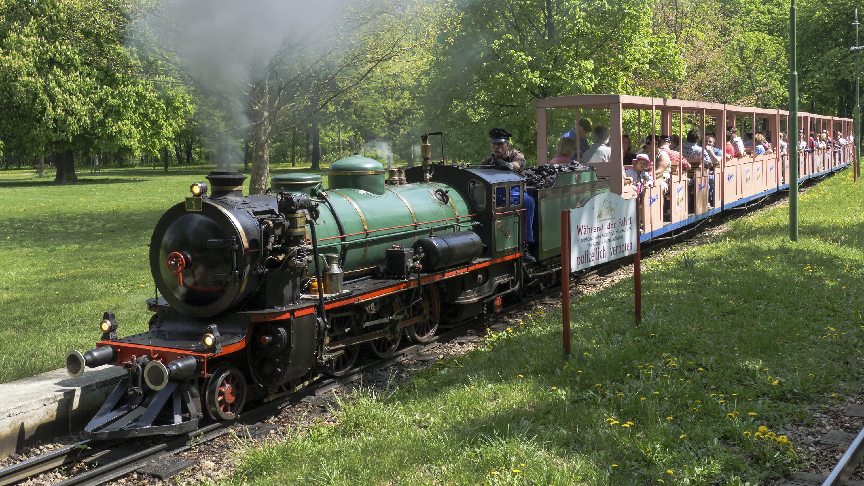 Liliputbahn Prater mit Lok Da1 in der Station Rotunde in Wien 2